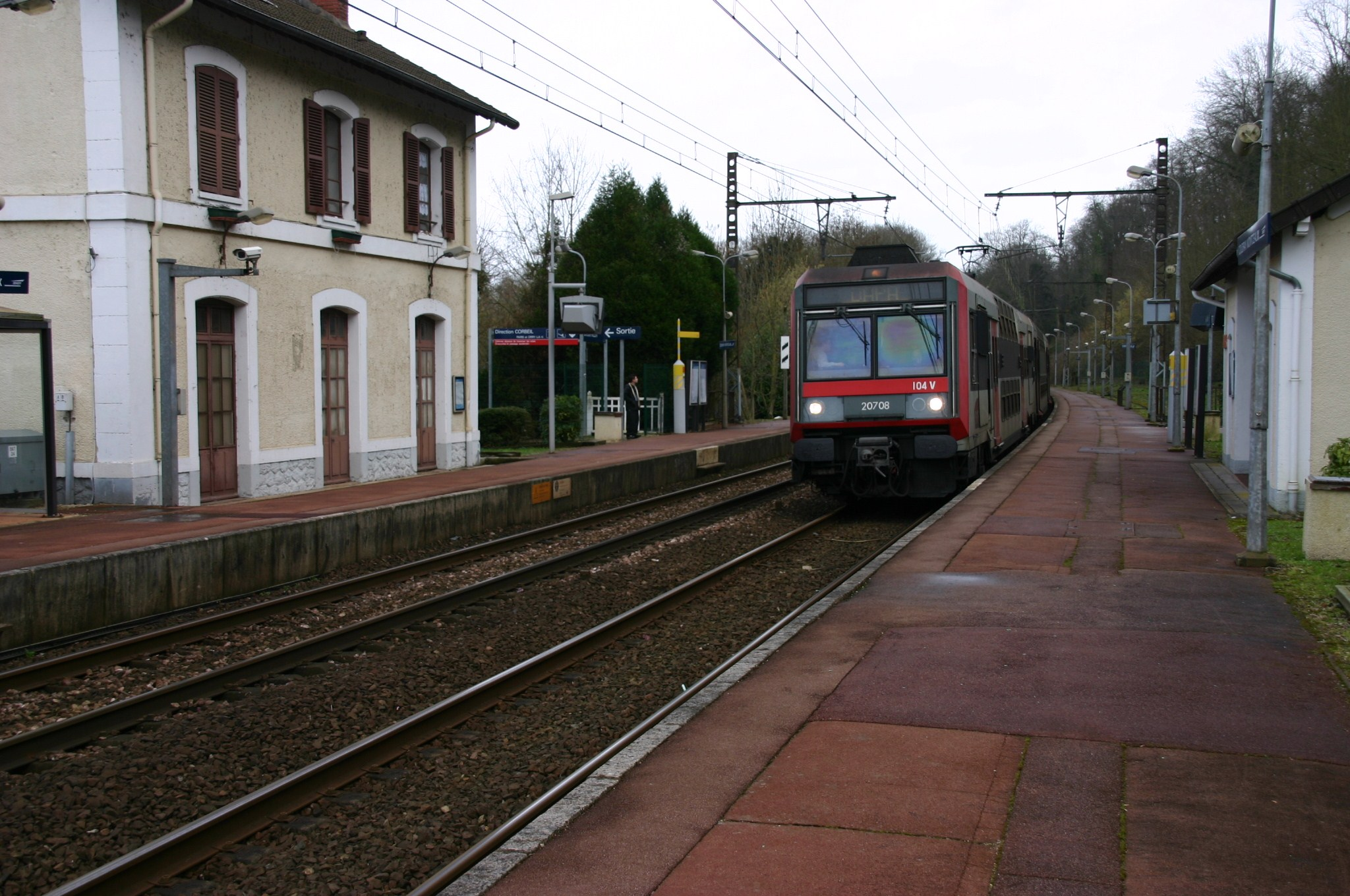 La gare du Coudray-Montceaux, Coudray-Montceaux, département de l'Essonne (France)